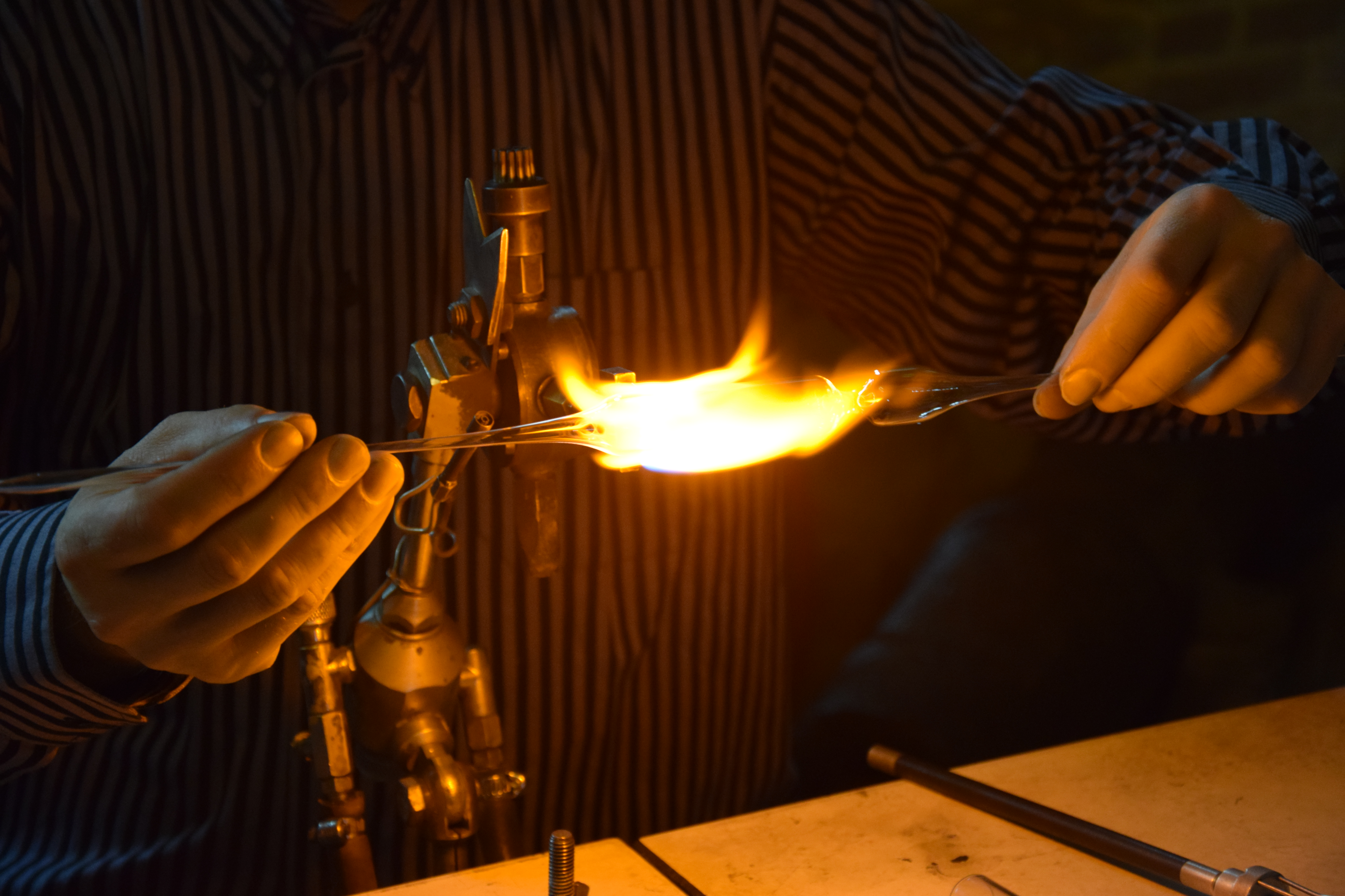 Intérieur du Château de Martainville - exposition travail du verre